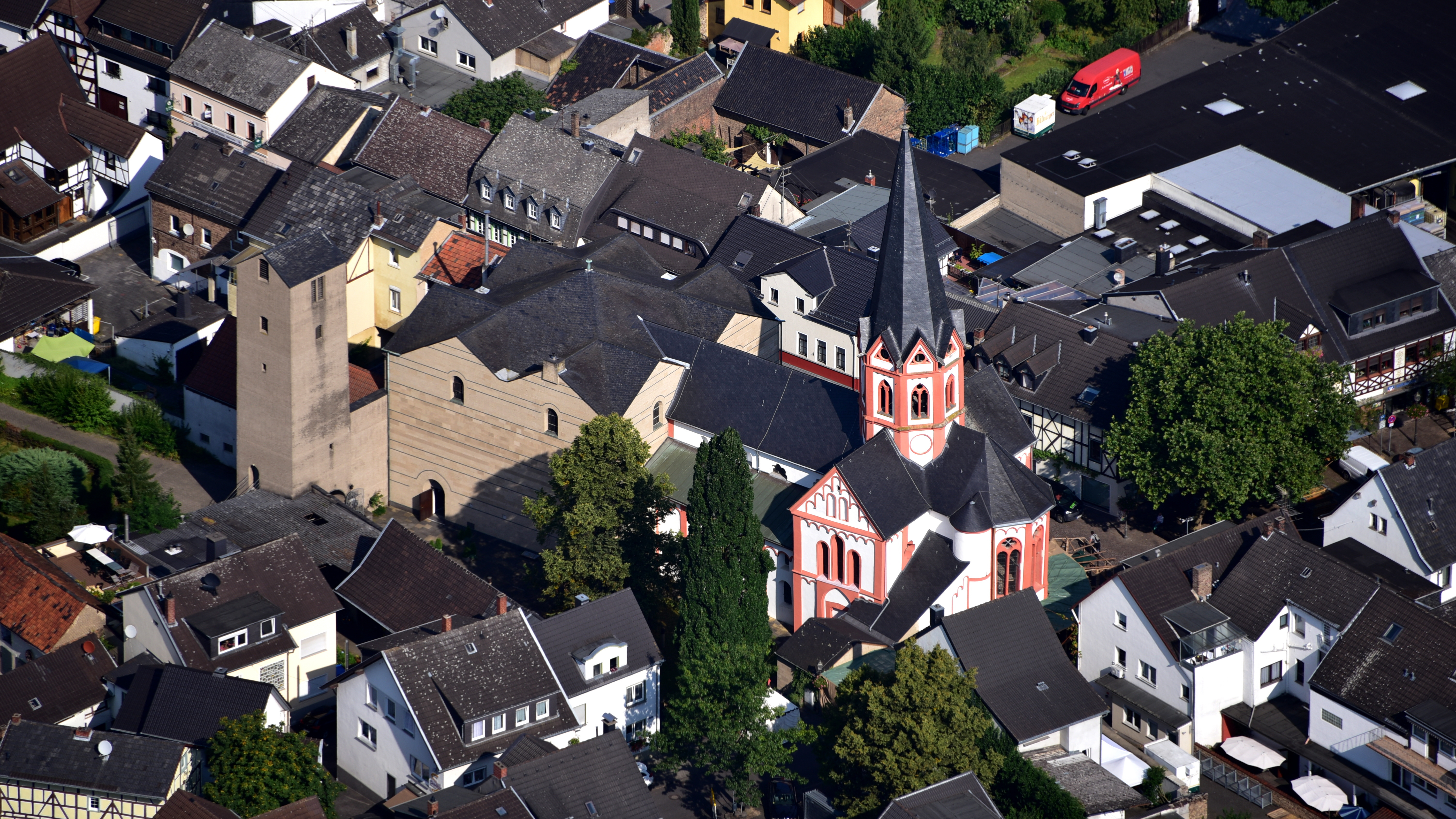 St. Mauritius (Heimersheim), Luftaufnahme (2016)